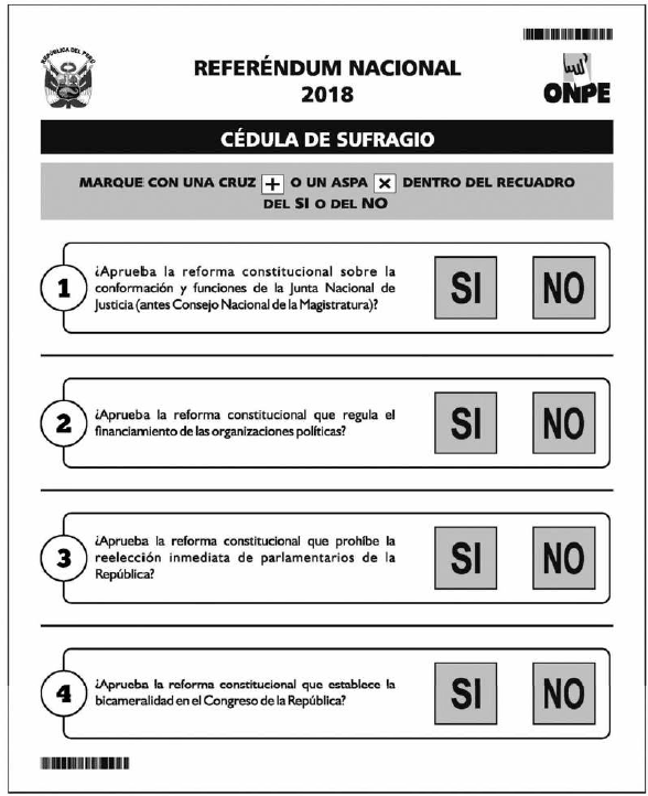 Diseño de la cédula de sufragio de votación manual para el Referéndum Nacional 2018